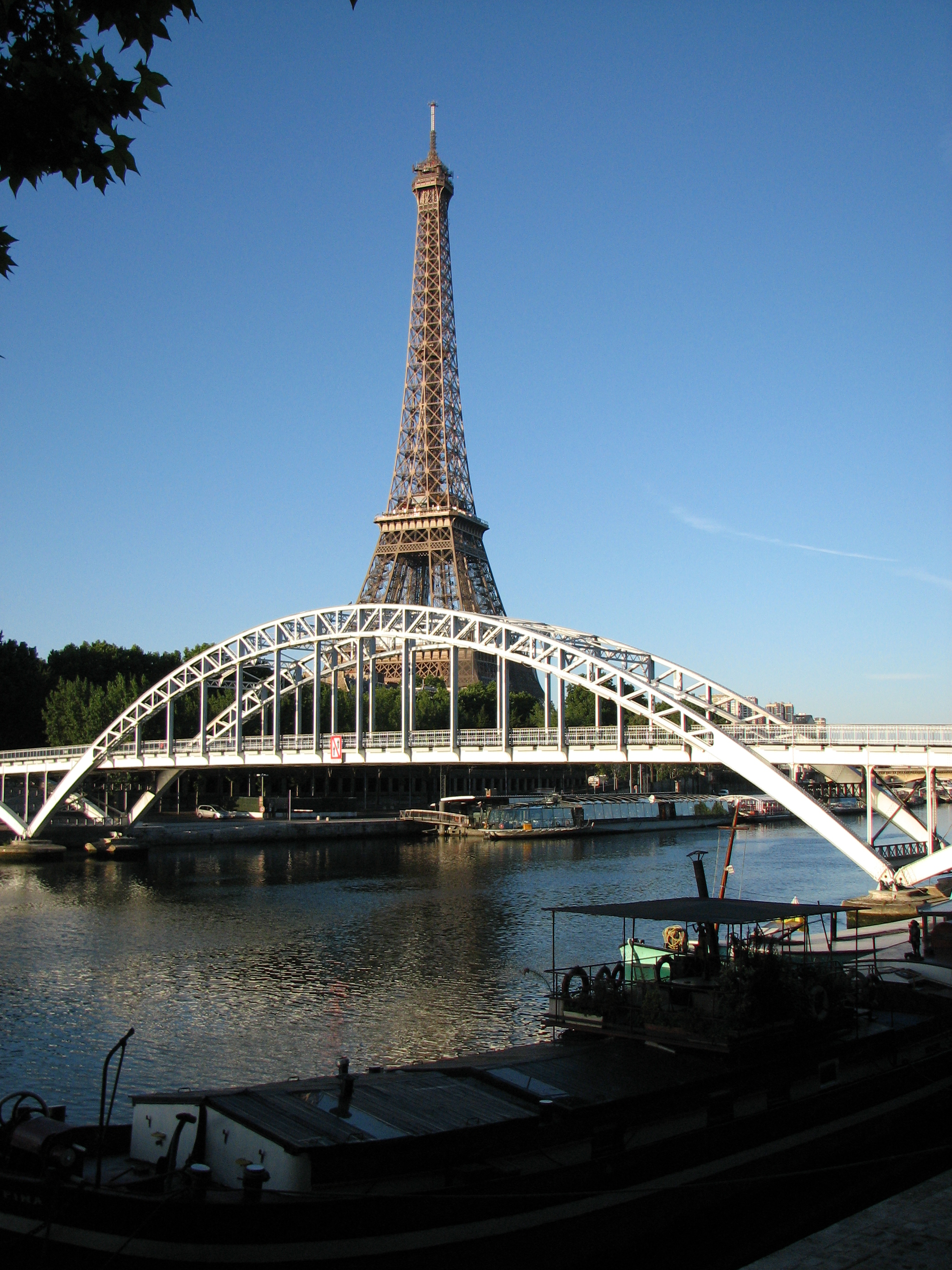 La passerelle Debilly et la tour Eiffel vue depuis la rive droit, en amont de la passerelle.